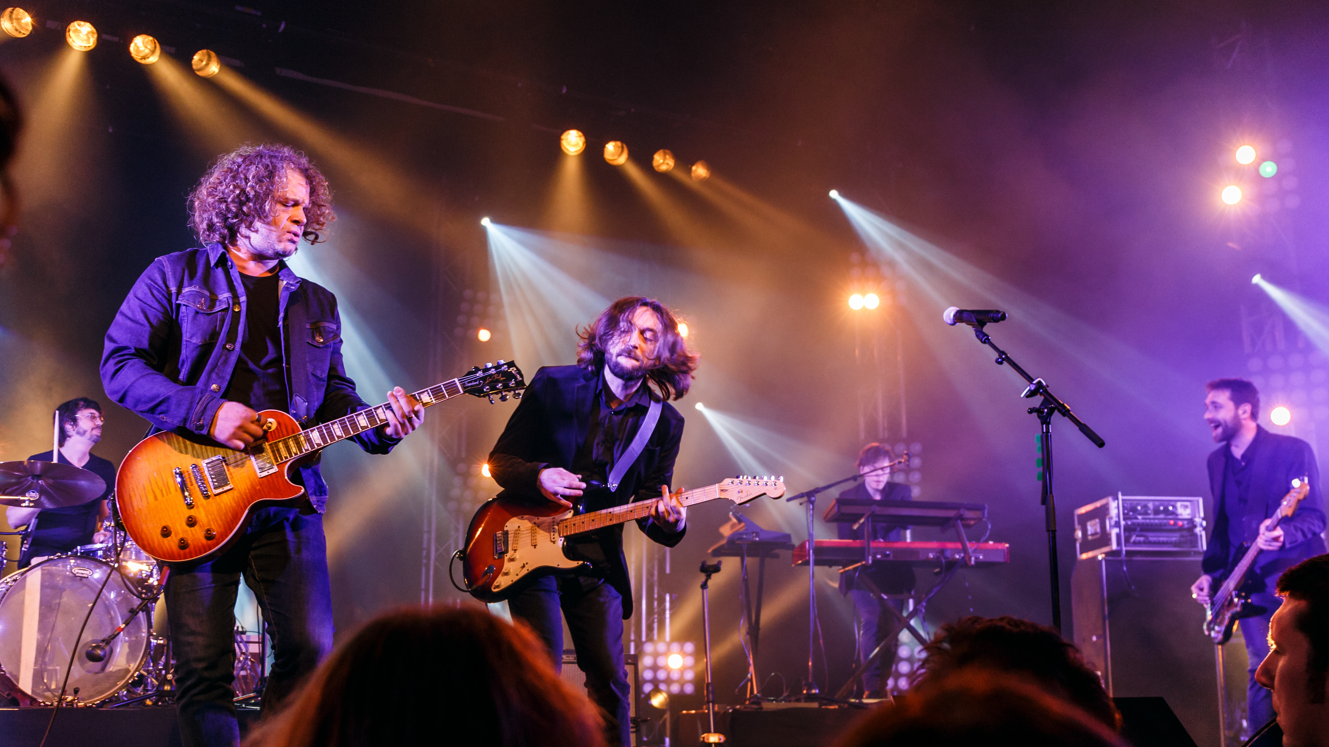 Premier concert du groupe Matmatah suite à sa reformation en 2016 à l'occasion de l'émission L'Avant-Scène tournée à l'Espace Avel Vor de Plougastel le 16 février 2017.